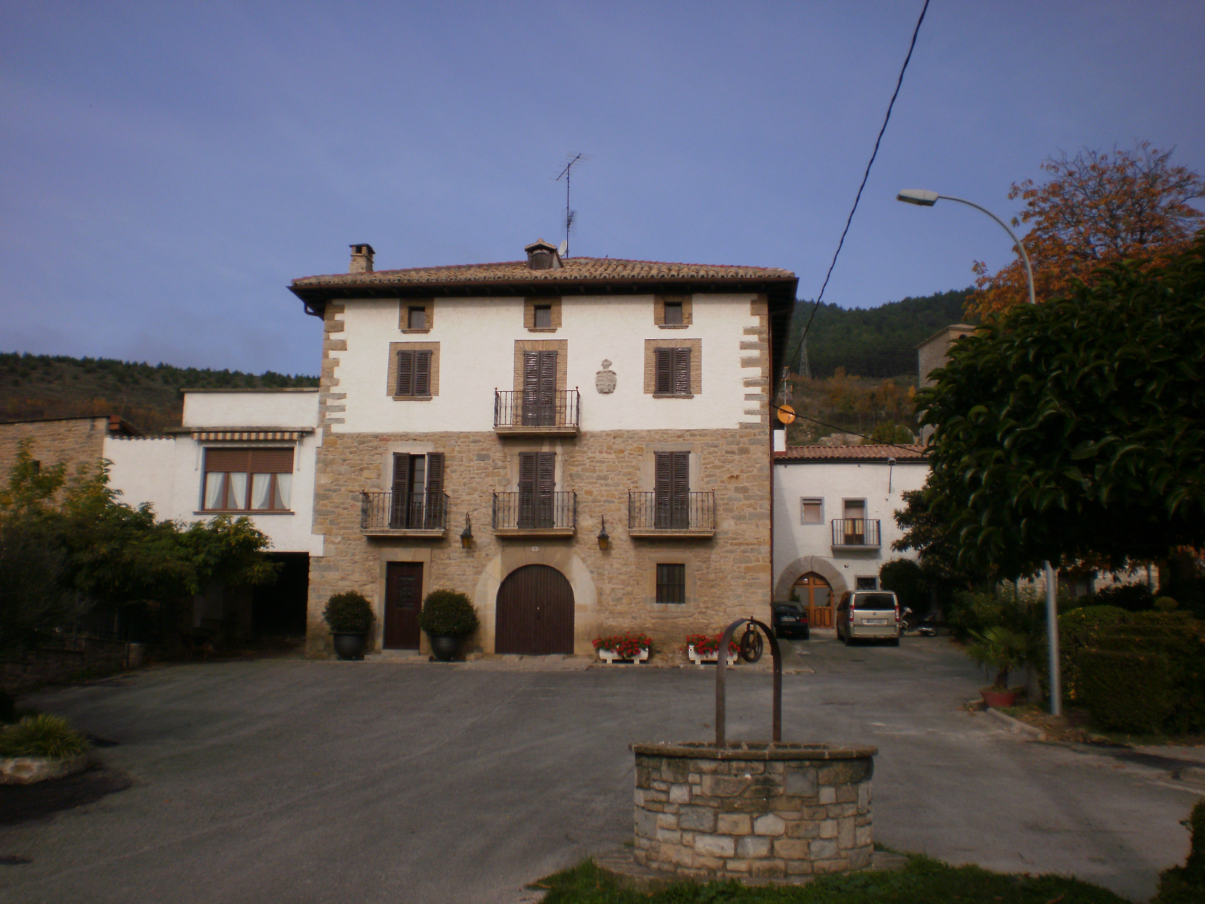 Palacio del Cabo de Armería de Ansoáin (Navarra-España)